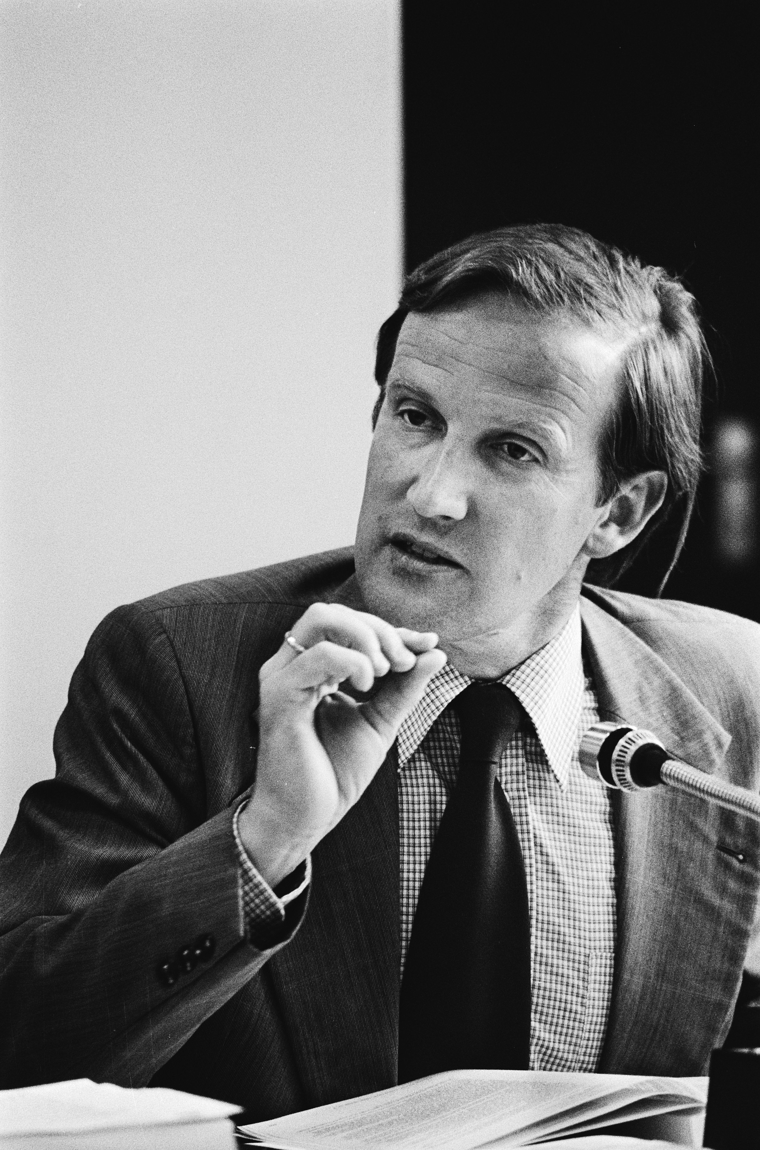 Collectie / Archief : Fotocollectie Anefo Reportage / Serie : Kamercommissie Patijn geeft een persconferentie over het rapport Aantjes Beschrijving : De heer Patijn Datum : 22 juni 1979 Locatie : Den Haag, Zuid-Holland Trefwoorden : commissies, persconferenties, politiek, portretten Persoonsnaam : Patijn, Schelto Fotograaf : Suyk, Koen / Anefo Auteursrechthebbende : Nationaal Archief Materiaalsoort : Negatief (zwart/wit) Nummer archiefinventaris : bekijk toegang 2.24.01.05 Bestanddeelnummer : 930-3275